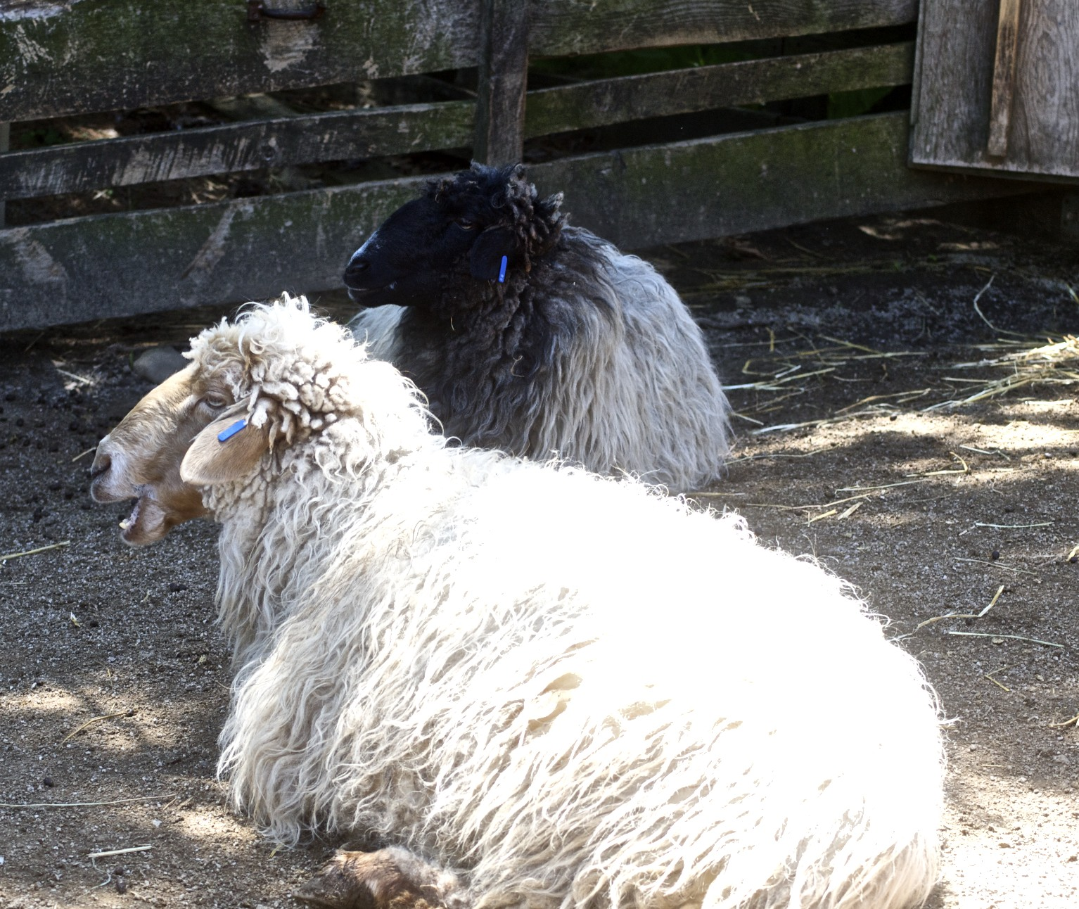 Karakul Sheep